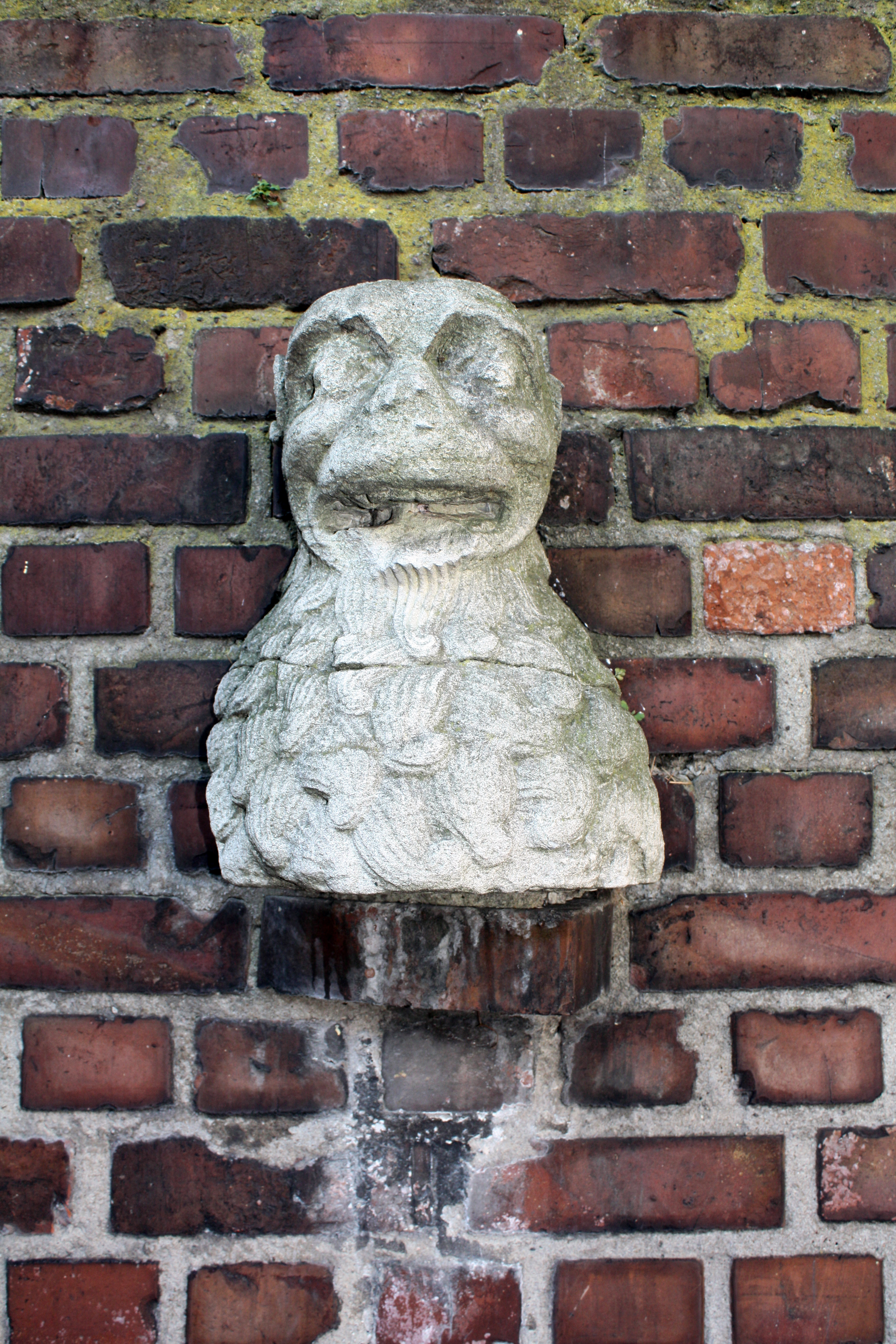 St. Kunibert Köln, Grinkopf an der Umfassungsmauer